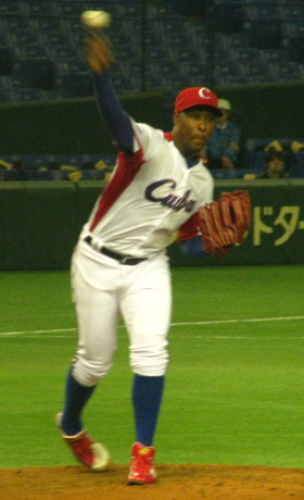 Danny Betancourt